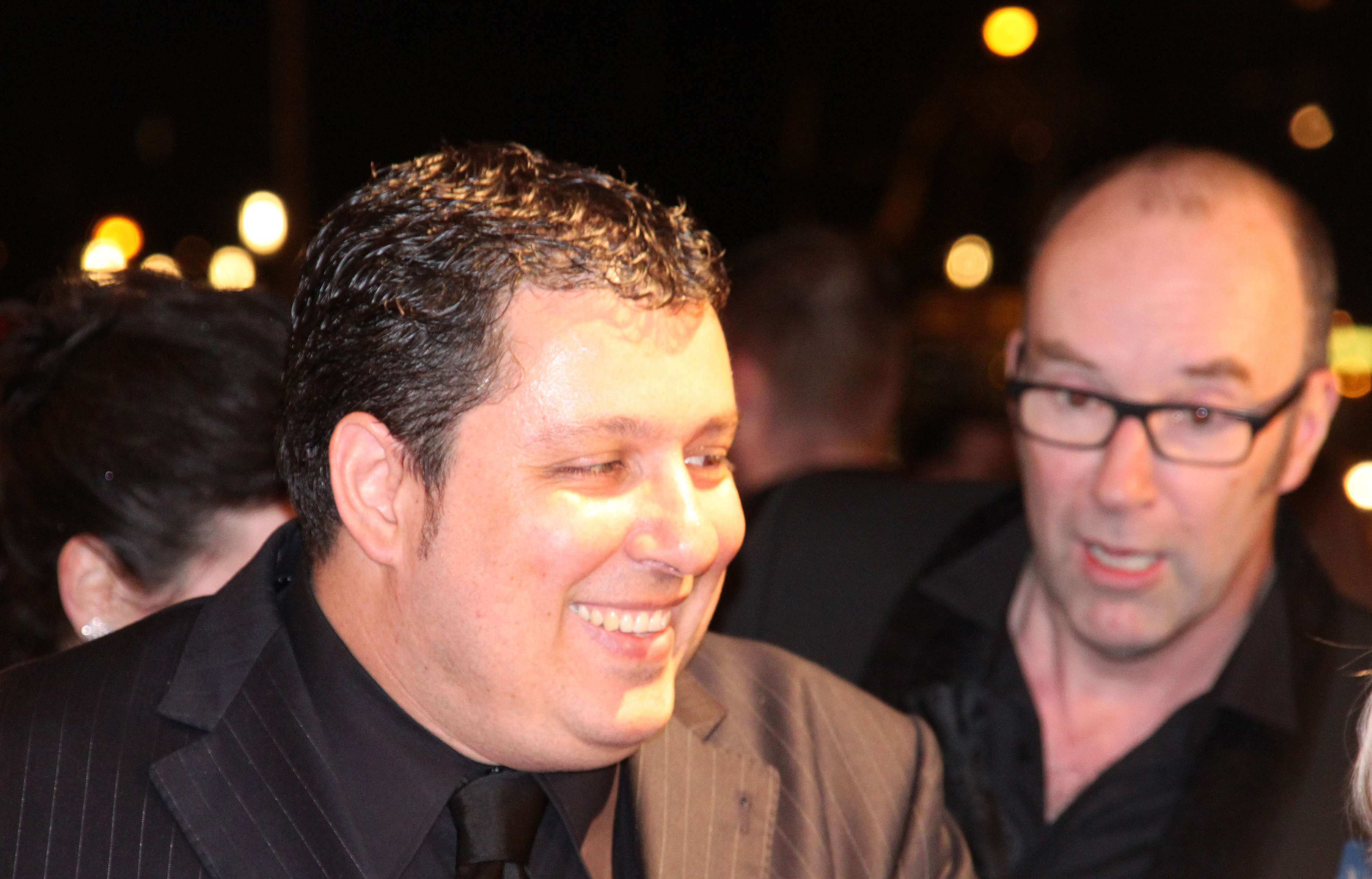 Robert Vuijsje. Op de achtergrond: Bart Chabot